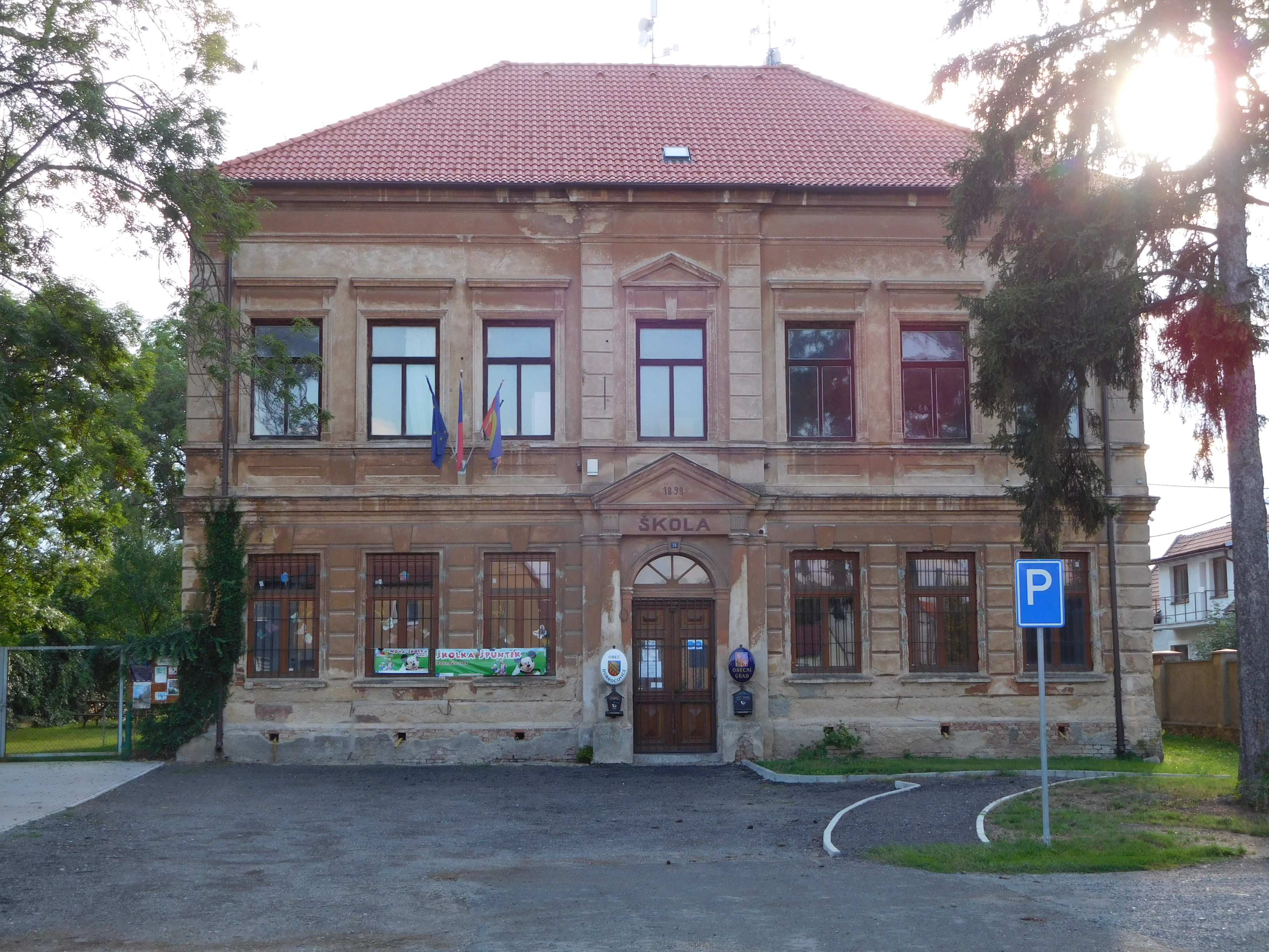 Dobročovice 38, obecní úřad a mateřská škola